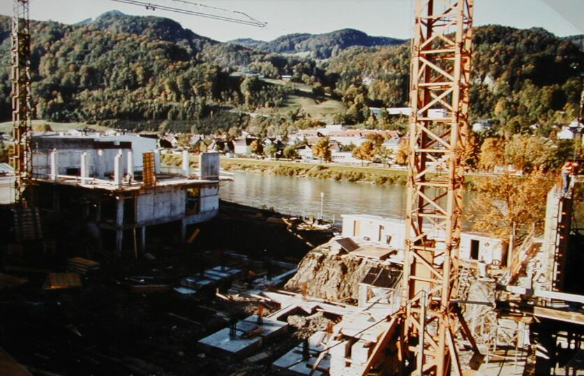 Baustelle für das neue Werkstättengebäude der HTL Hallein 1980